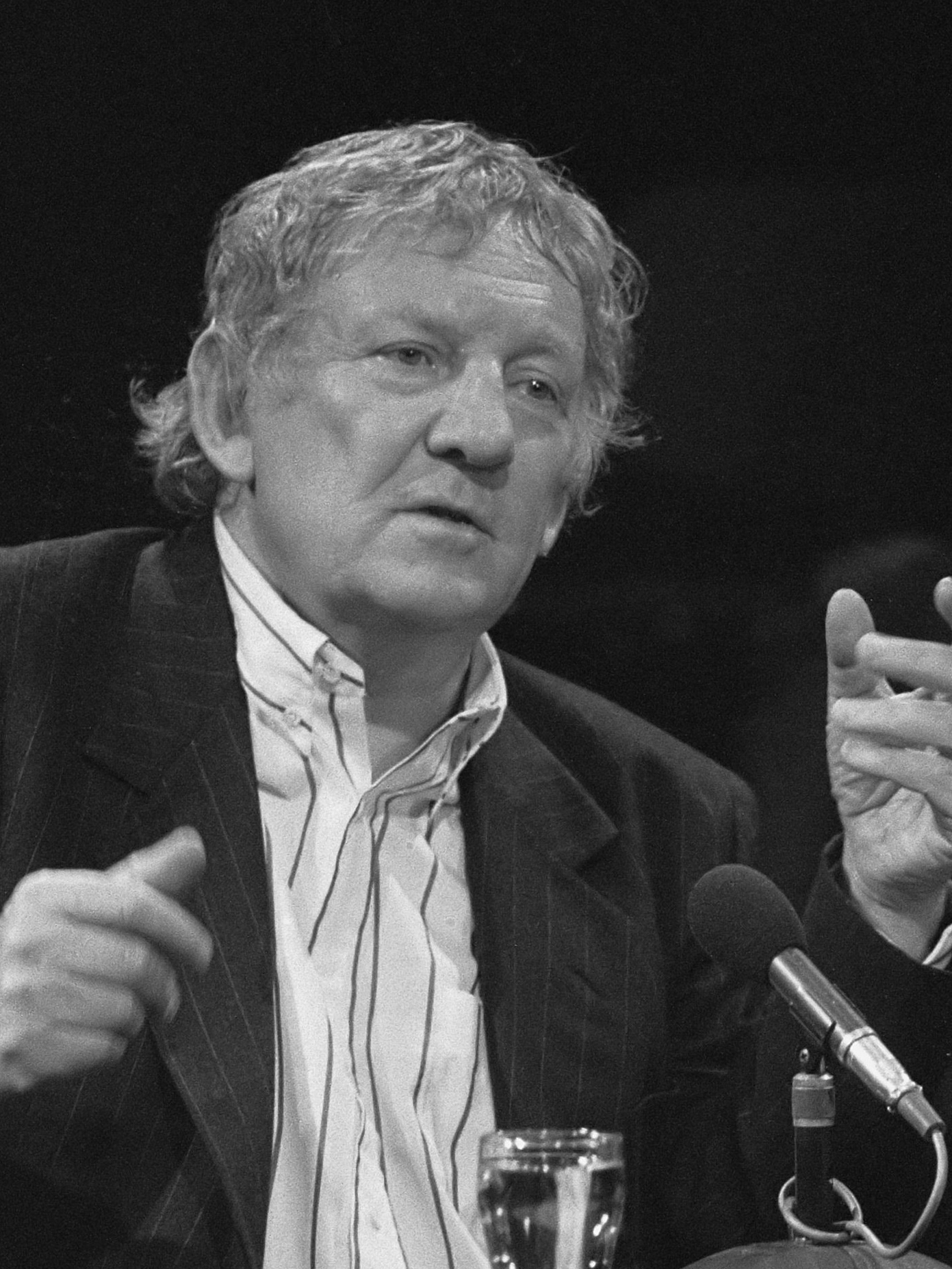 Hugo Claus in Vlaams Cultureel Centrum op Hugo Claus avond 15 november 1986